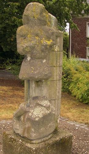 Ritterdenkmal am alten Kloster Zand in Straelen (Deutschland)